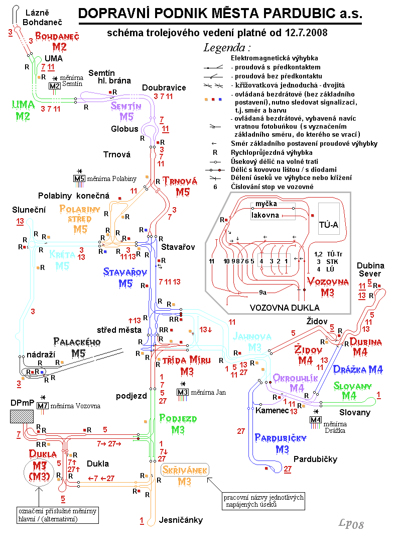 Plán sítě trolejbusů v Pardubicích - léto 2008.